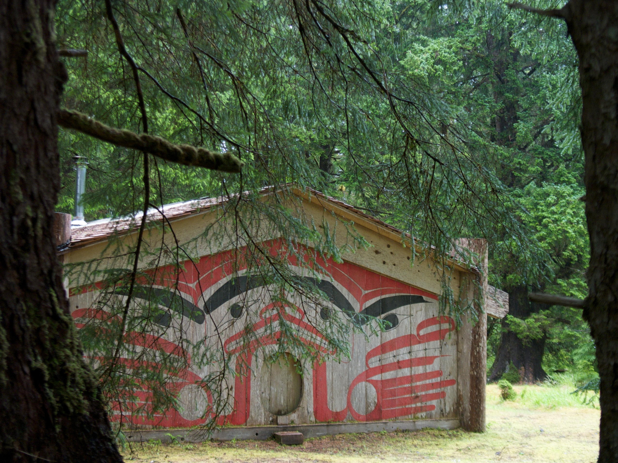 Windy Bay, Gwaii Haanas, Haida Gwaii